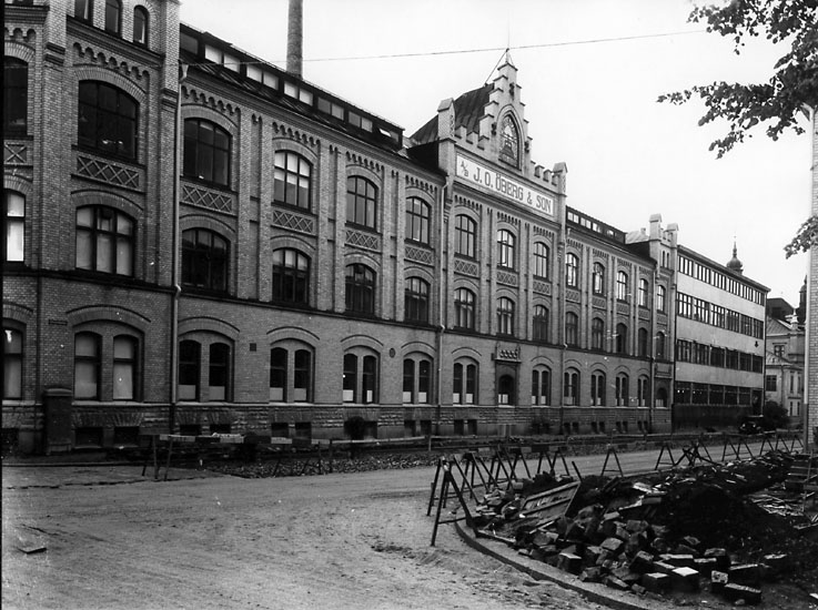 AB J.O. Öberg & sons fabrik på Gymnastikgatan i Eskilstuna. Byggnadsår 1898-1900. Arkitekt: Anders Emil Befwe. Bilden är tagen någon gång mellan 1904 och 1944. Huset står fortfarande kvar men skylten med företagsnamnet är borta.